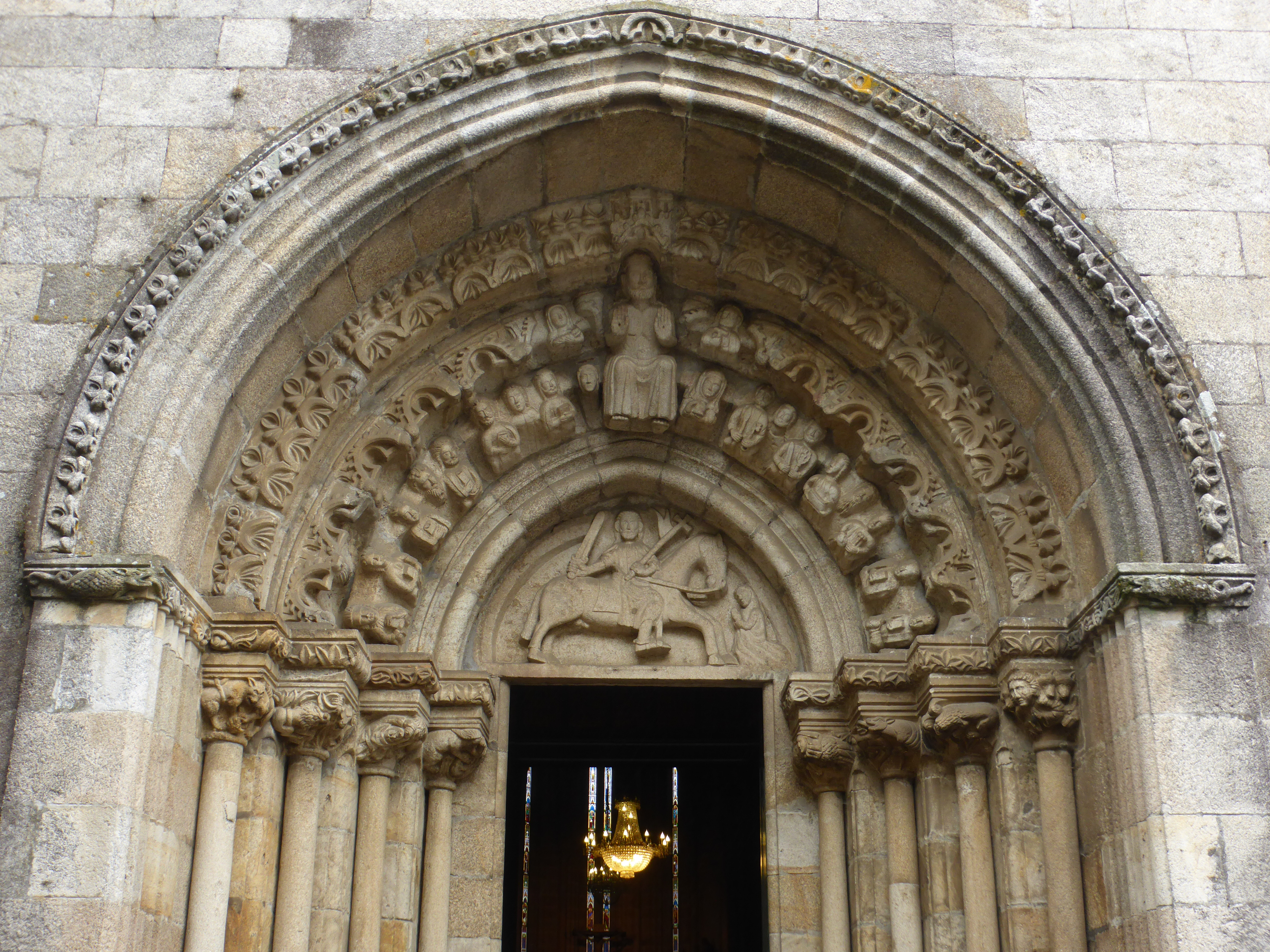 Iglesia gótica del siglo XIV. Portada en estilo de transición entre el románico y el gótico.